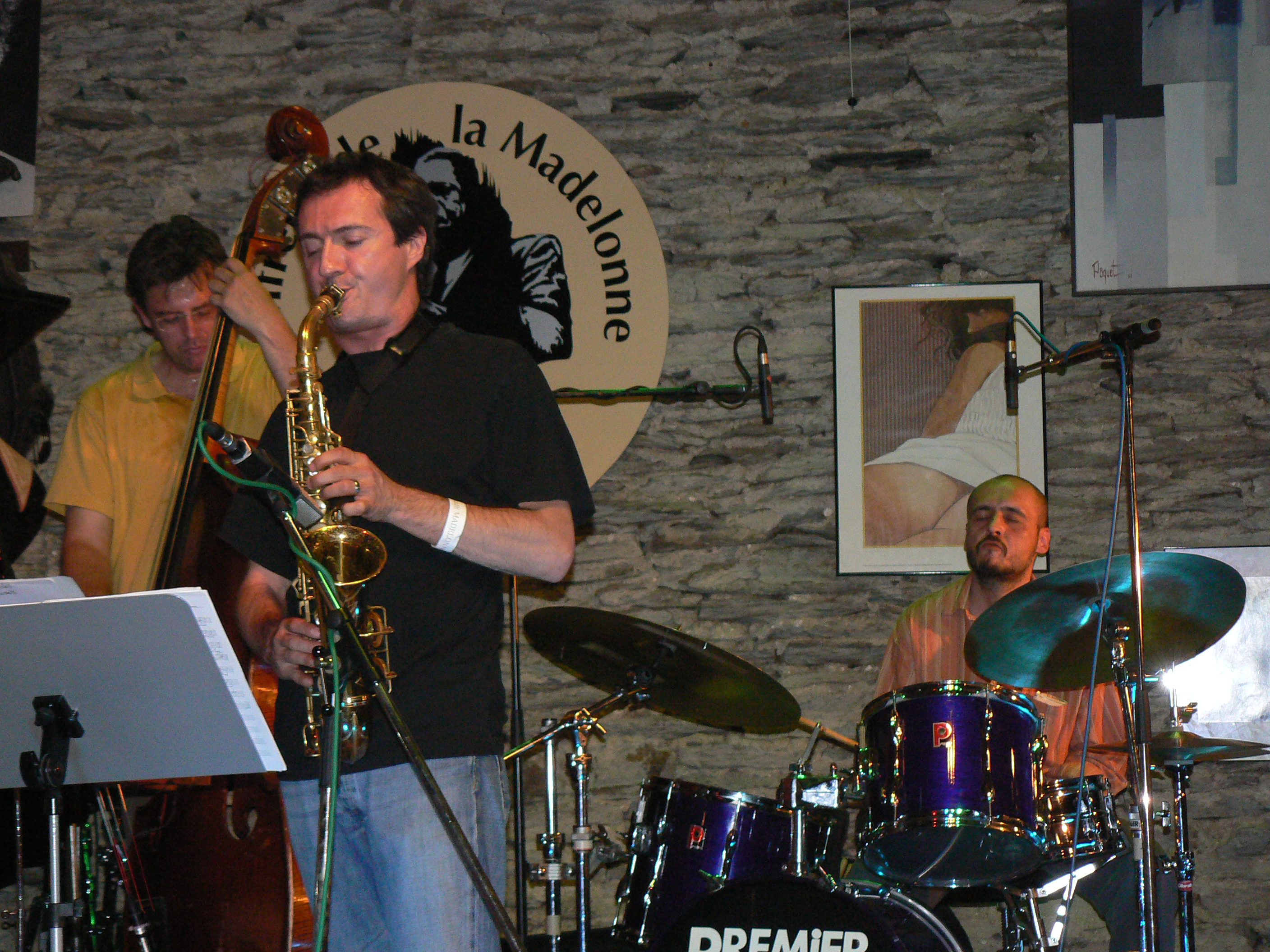 L'ensemble Stéphane Mercier Quartette au Jazz & Blues Festival de Gouvy 2008.